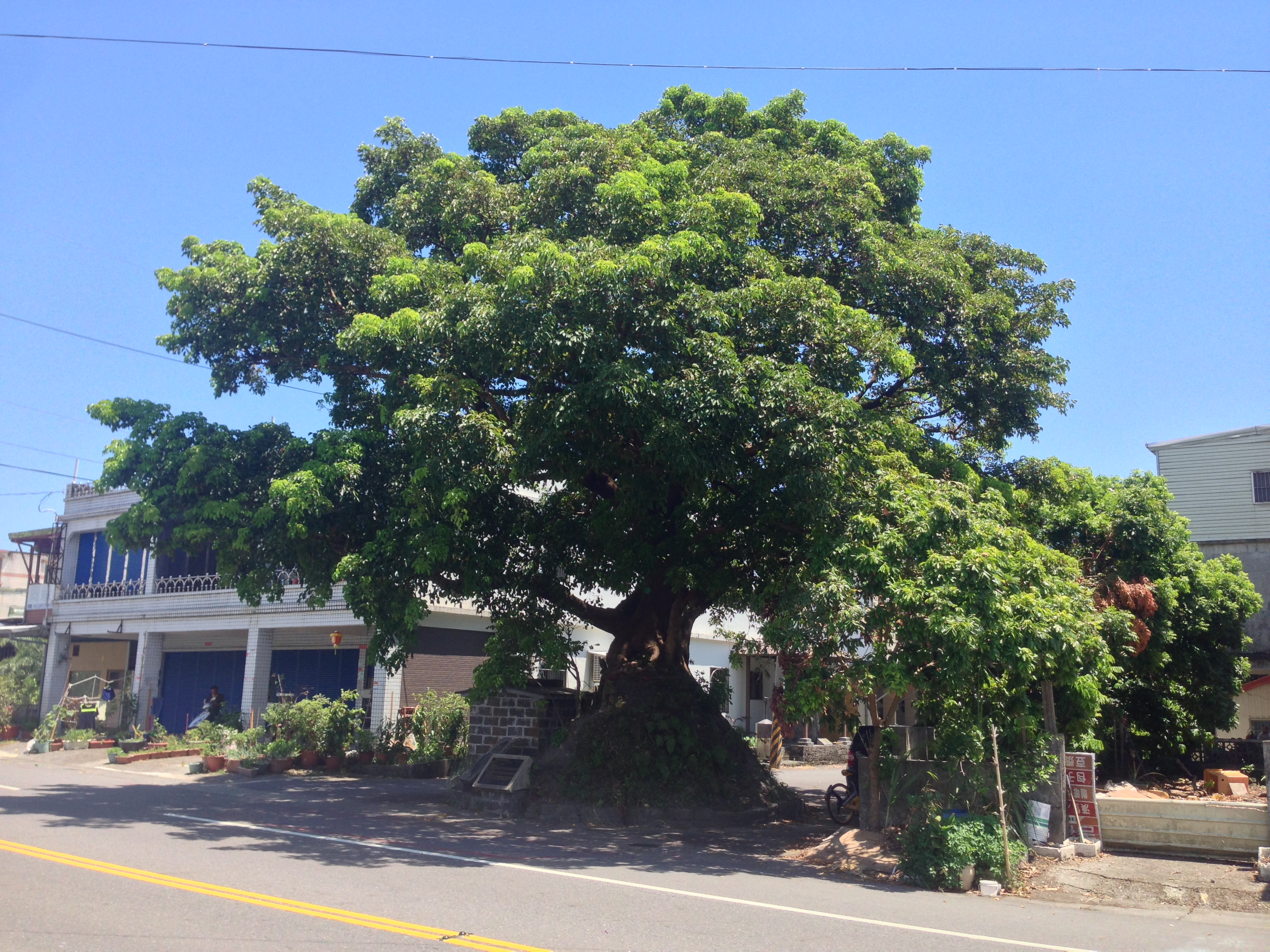 中文（台灣）: 員山結頭份大樹公近照